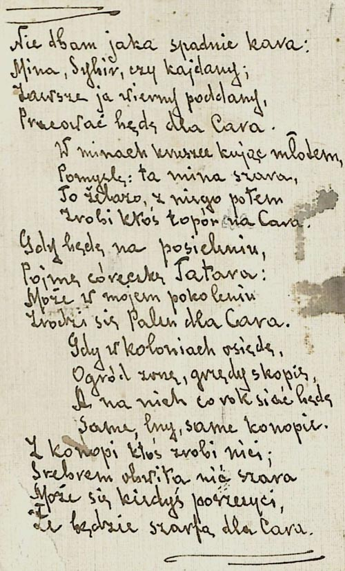 “Nie dbam jaka spadnie kara…” - песня изгнанников. Отрывок из поэмы Адама Мицкевича “Дзяды”. 1860-ые гг. Автограф [К.С. Костровицкого]. На польском языке.